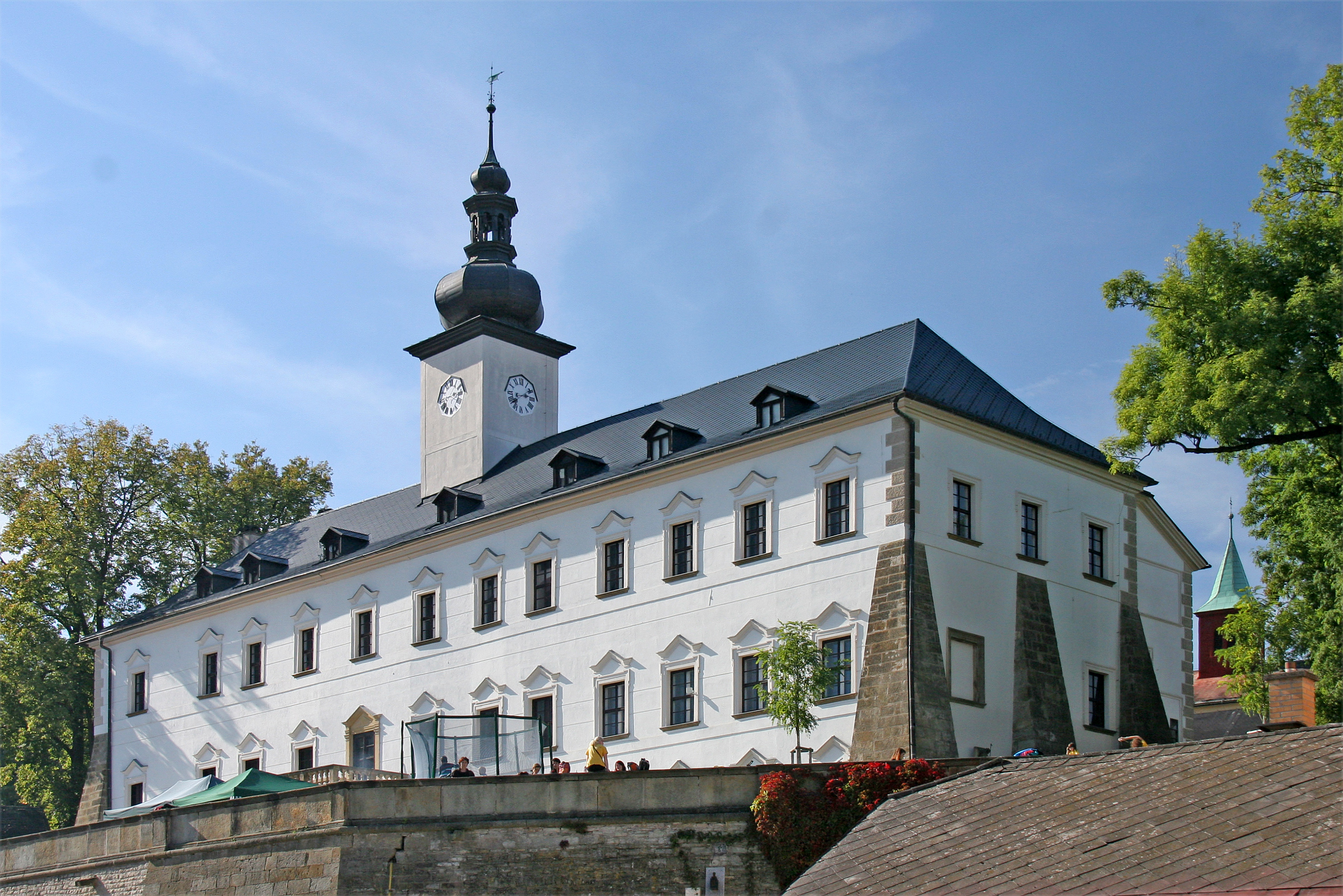 Zámek Letohrad, Václavské náměstí 1, 2, Letohrad.